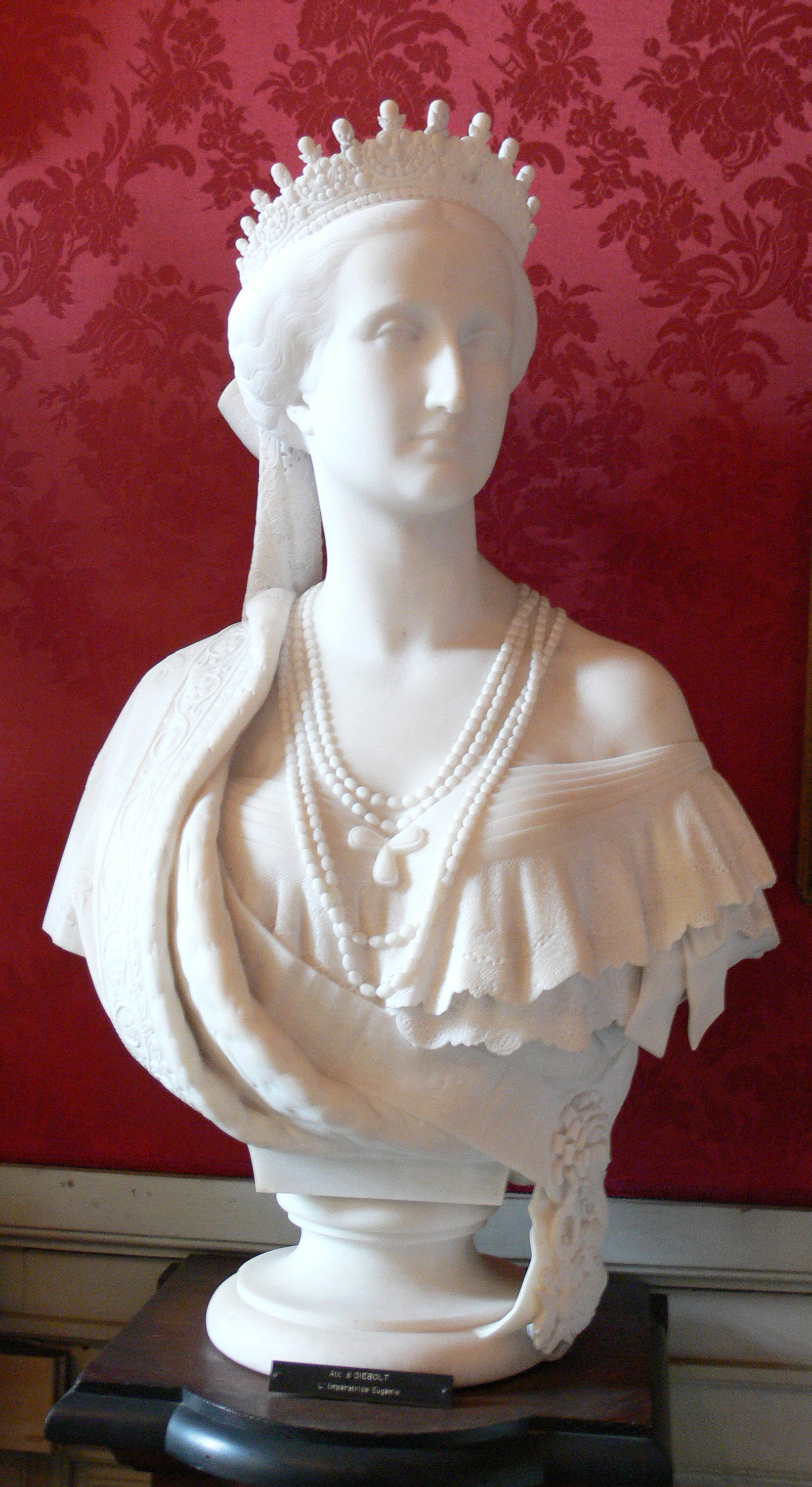 Compiègne, France: Château de Compiègne; Musée du Second Empire: Portrait en buste d'Eugénie de Montijo ; attribué à Diebolt